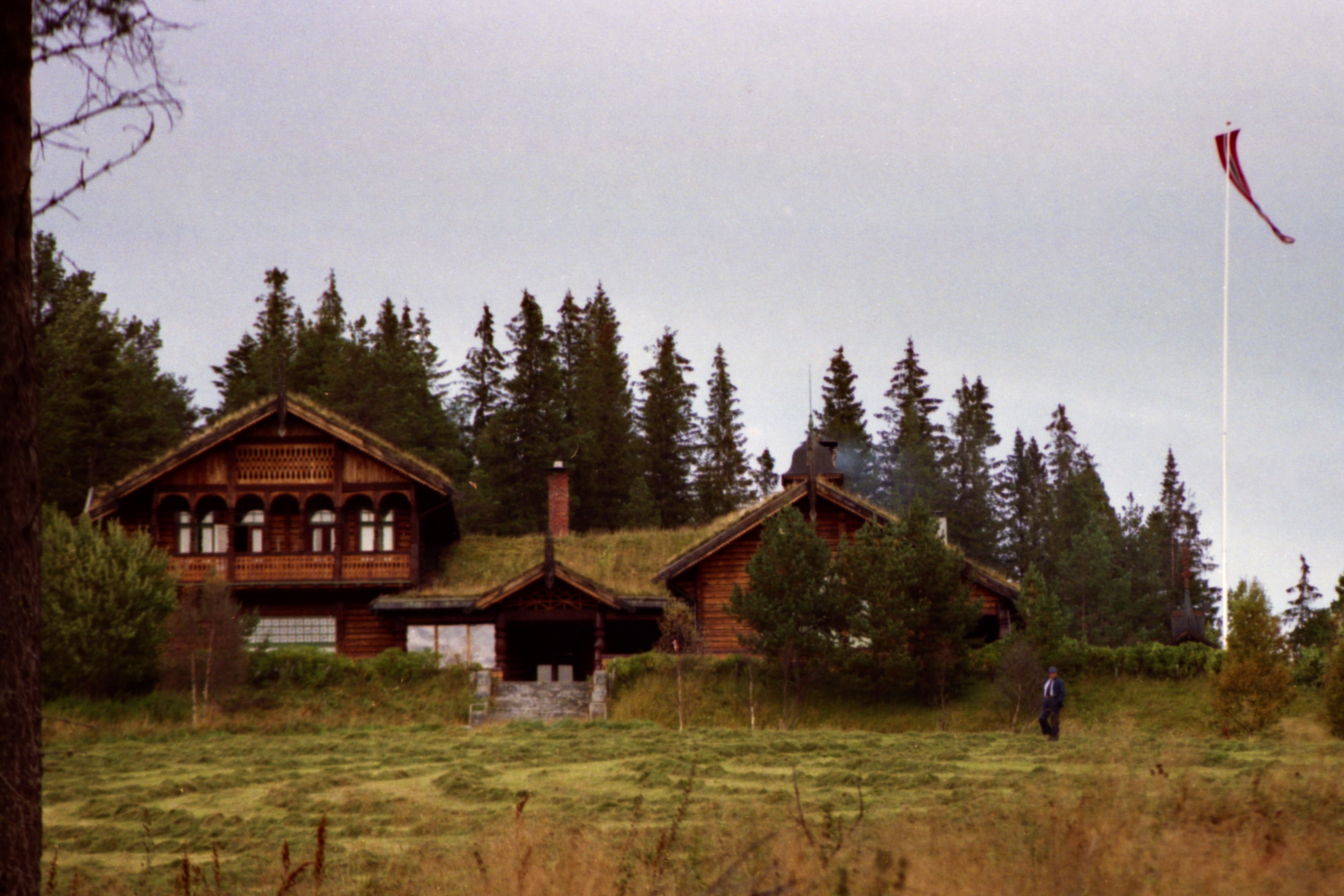 Fjeldheim i Meldal kommune.